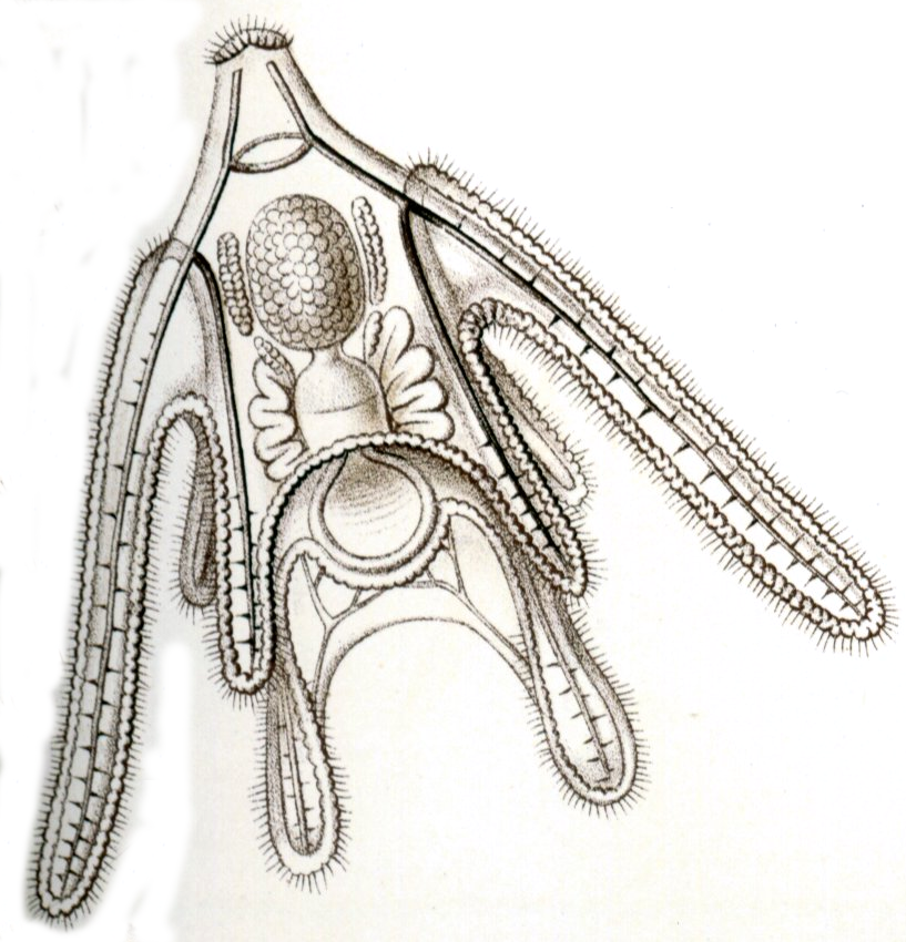 Ophiura albida from 'Haeckel Ophiodea'